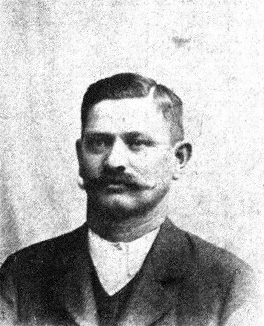 Österreichischer Politiker, Reichsratswahl 1907, Name siehe Dateiname